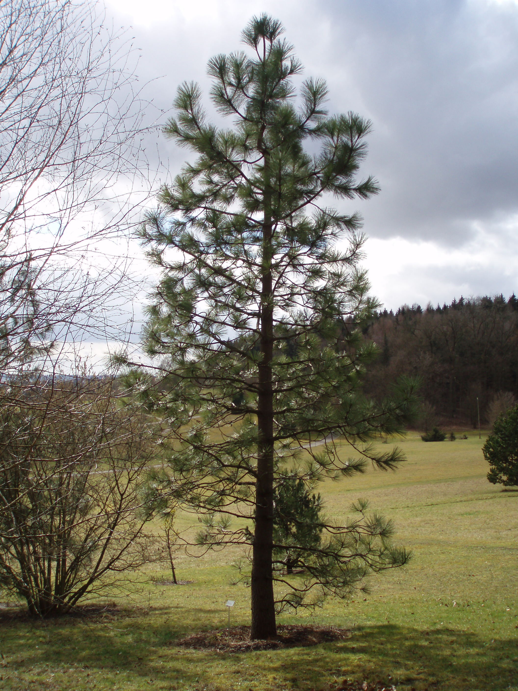 Pinus jeffreyi: Junger Baum im Arboretum des Botanischen Gartens Ulm